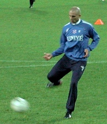 The soccer player Afonso Alves.